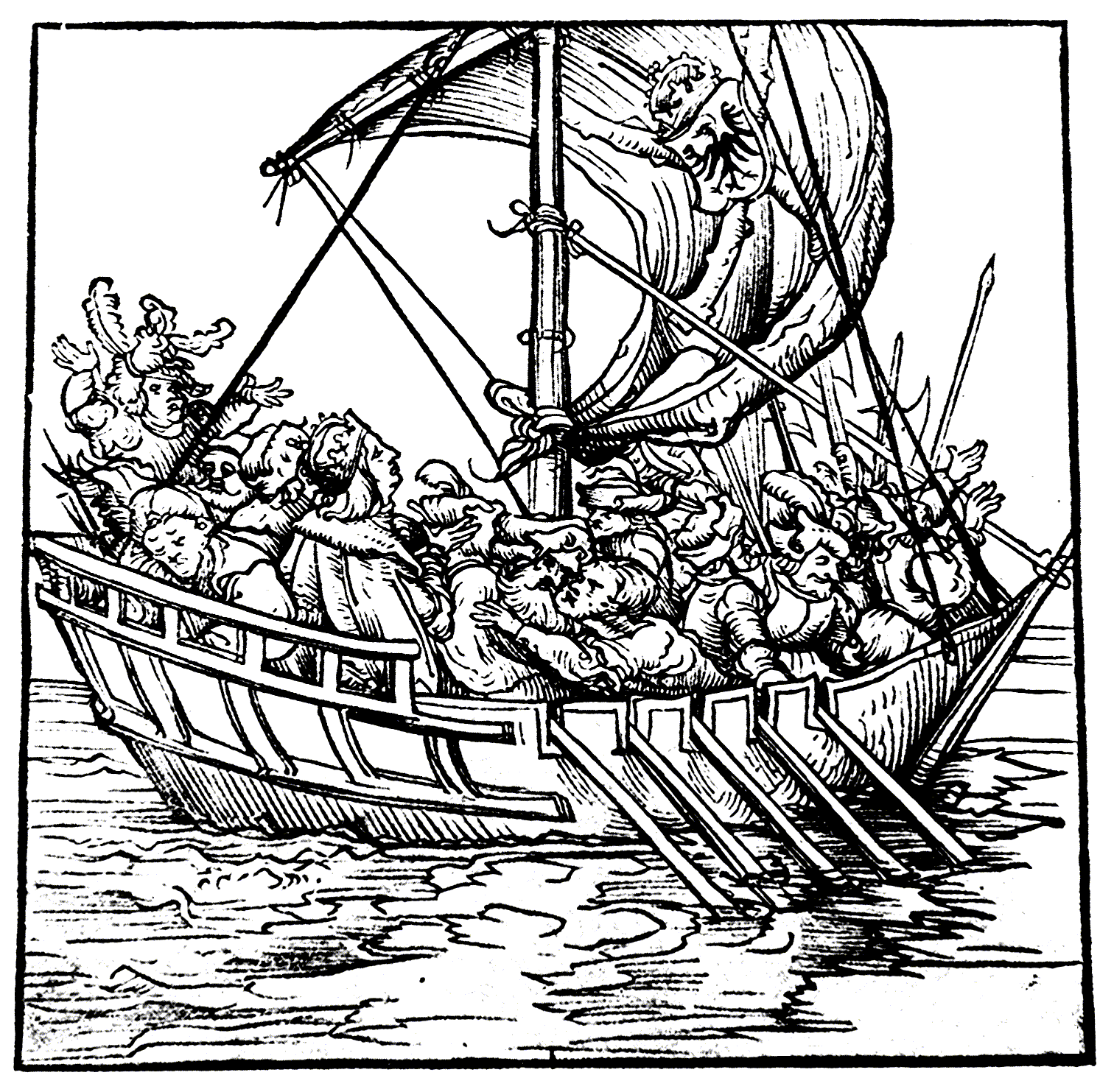 Maximilian I. (linke Bildhälfte) und Ritter Florian Waldauf (links neben Maximilian) geraten in der holländischen Zuidersee in Seenot. Holzschnitt aus dem Haller Heiltumbuch, Pfarrarchiv Hall in Tirol